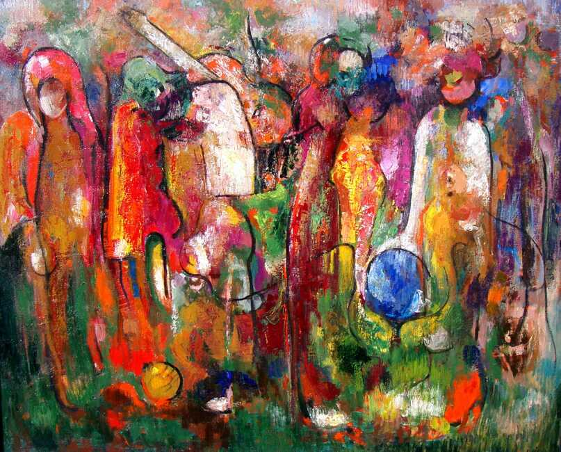 Komposition von George Stefanescu, Öl/Leinwand, 1978